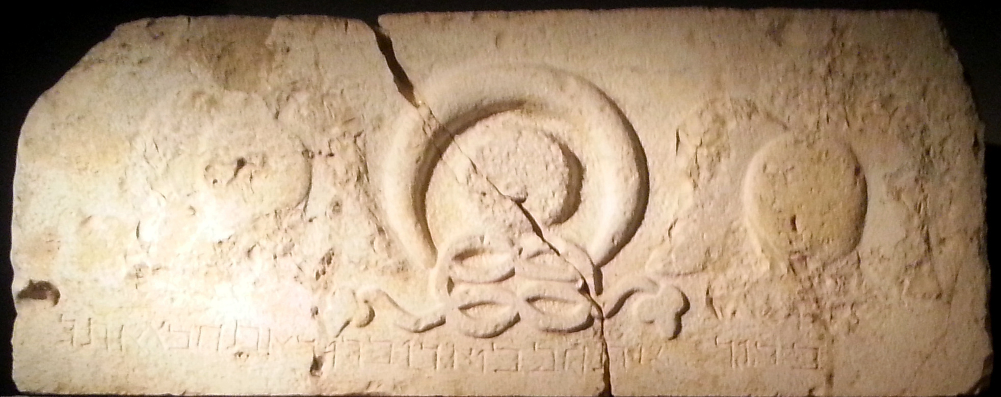 מוצג במוזאון ישראל בירושלים ;"כתובת מרות בגליל העליון: "ברוך אתה בבואך וברוך אתה בצאתך